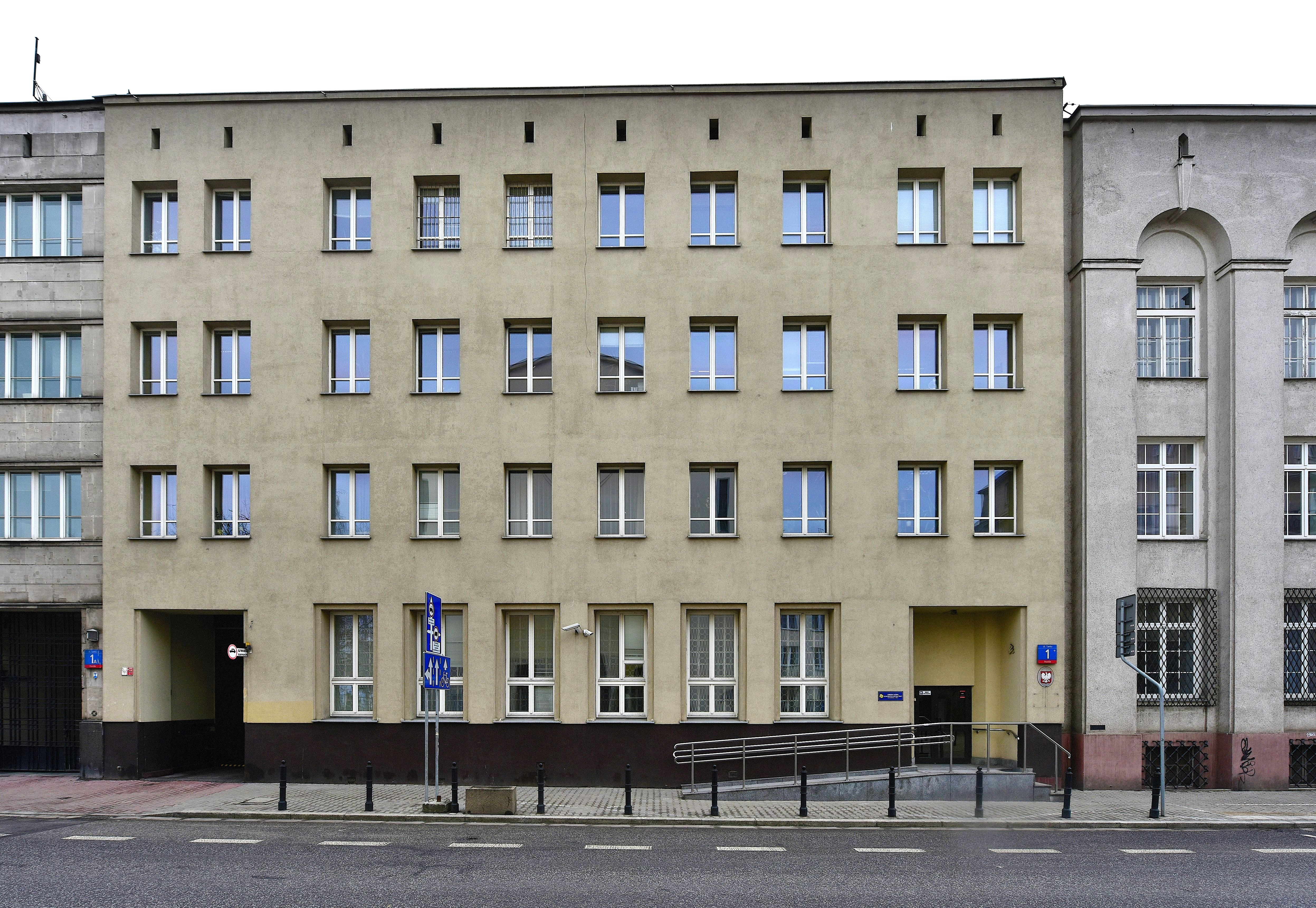 Siedziba Komendy Głównej Ochotniczych Hufców Pracy (OHP) przy ul. Tamka 1 w Warszawie